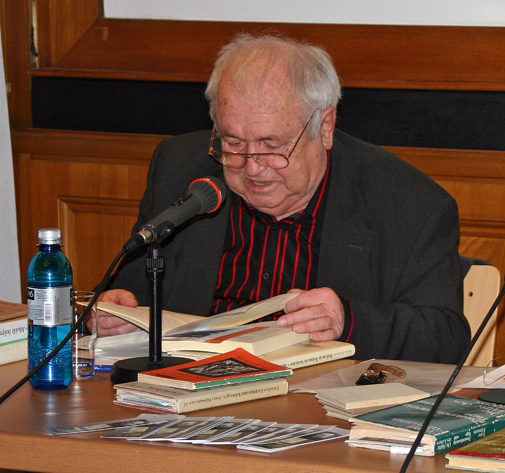 (Photographie: © internationaler Franz Fühmann Freundeskreis)